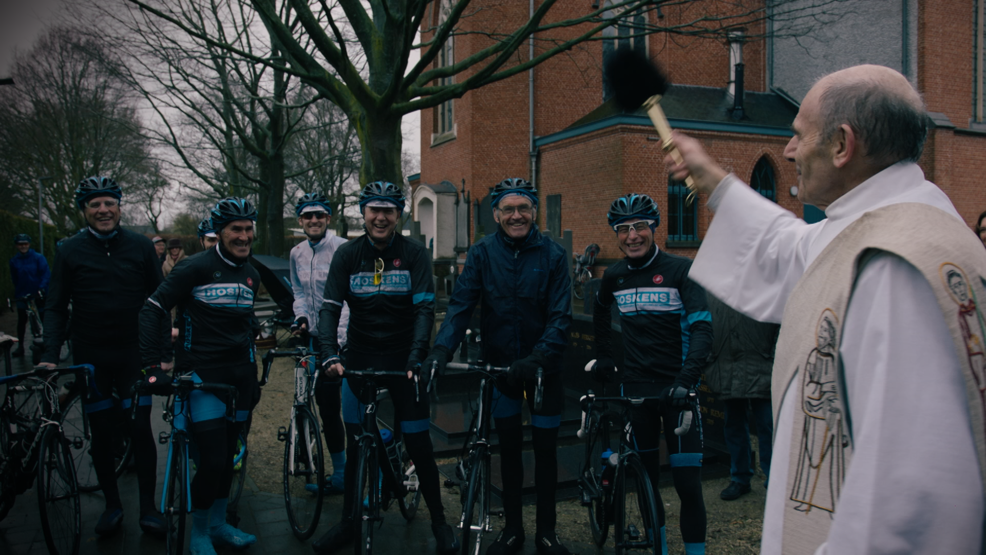 Fietsenwijding aan de kerk Onze-Lieve-Vrouw Onbevlekt Ontvangen in Klein-Sinaai. Diaken Jacques Van Daele zegent de wielertoeristen op zaterdag 2 maart 2019